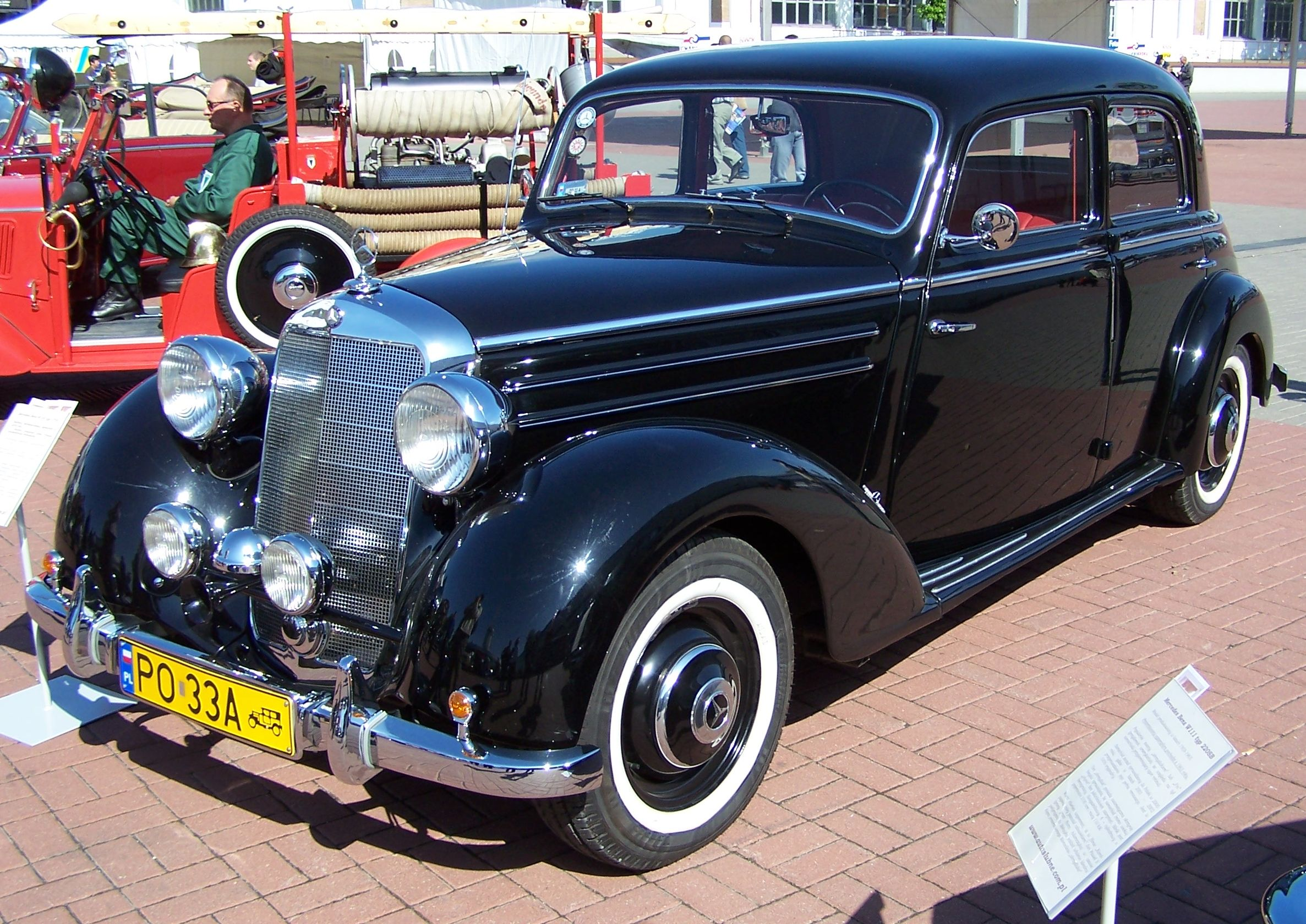 Mercedes Benz W136 170S